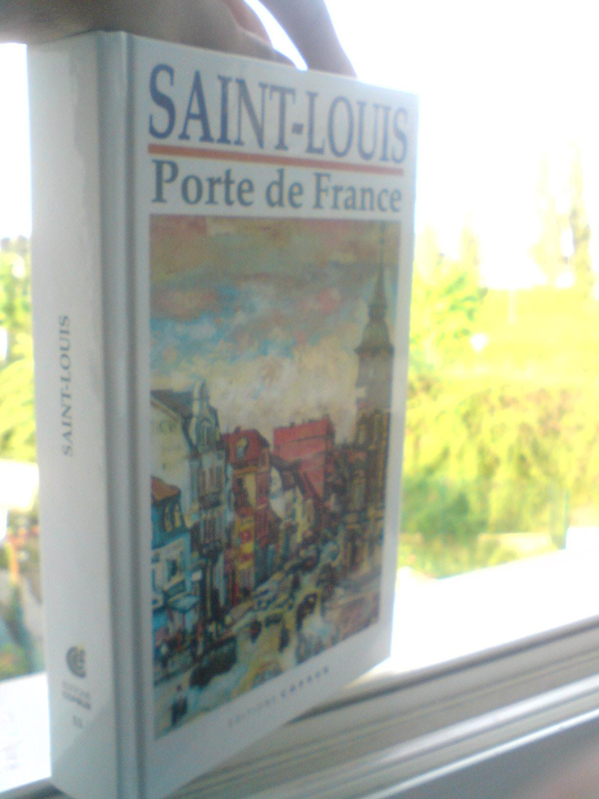 Couverture et côte du livre Saint-Louis Porte de France que je tiens dans ma main.